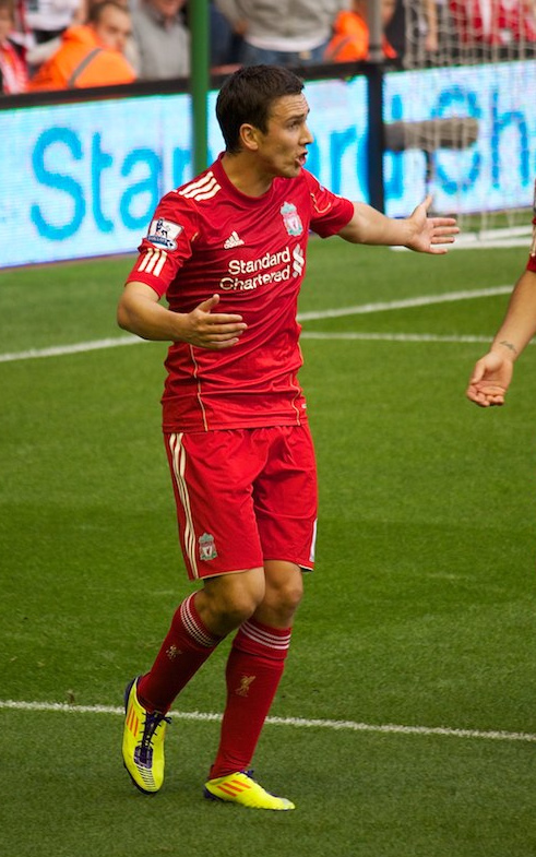 Liverpool vs Bolton 27/08/2011